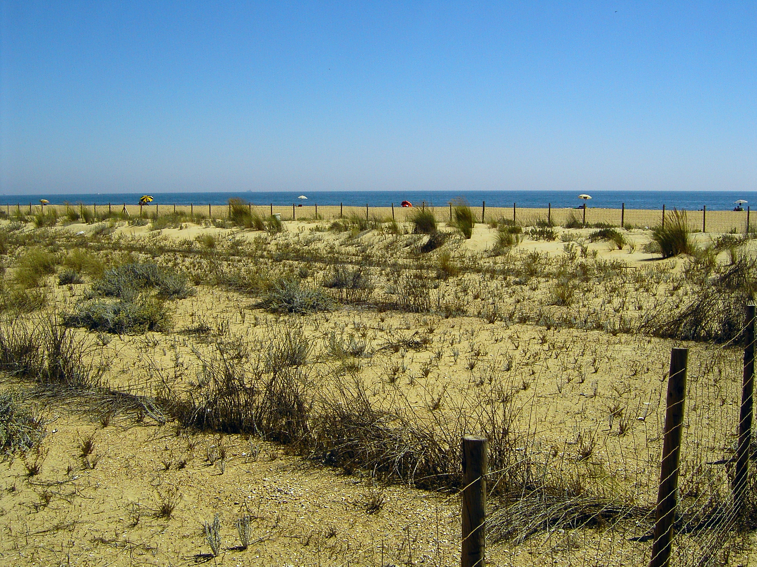 Playa del Espigón (Huelva)